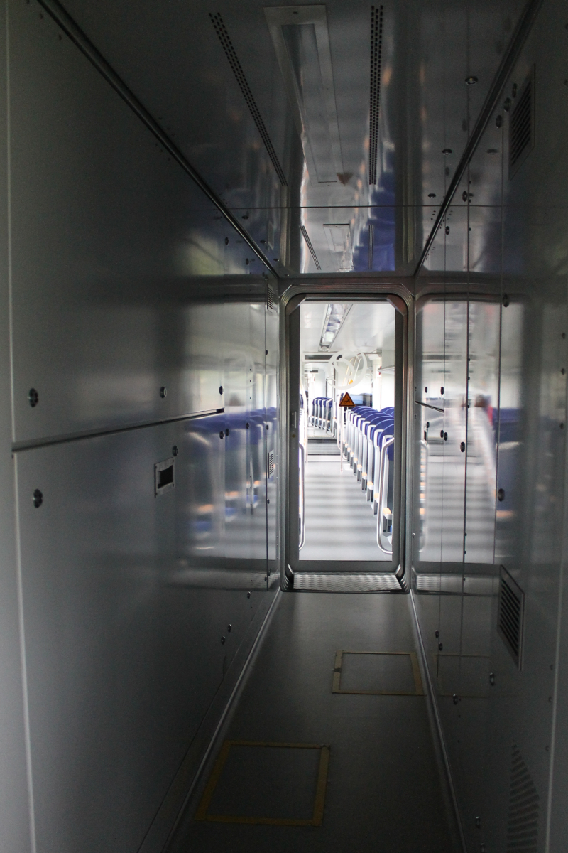 Wnętrze power packa pojazdu Stadler GTW dla Arriva NL na terenie zakładu Stadler Polska w Siedlcach. This photo was taken during Railway Wikiexpedition 2014 set up by Wikimedia Polska Association in cooperation with Fundacja Grupy PKP. You can see all photographs in category Wikiekspedycja kolejowa 2014.